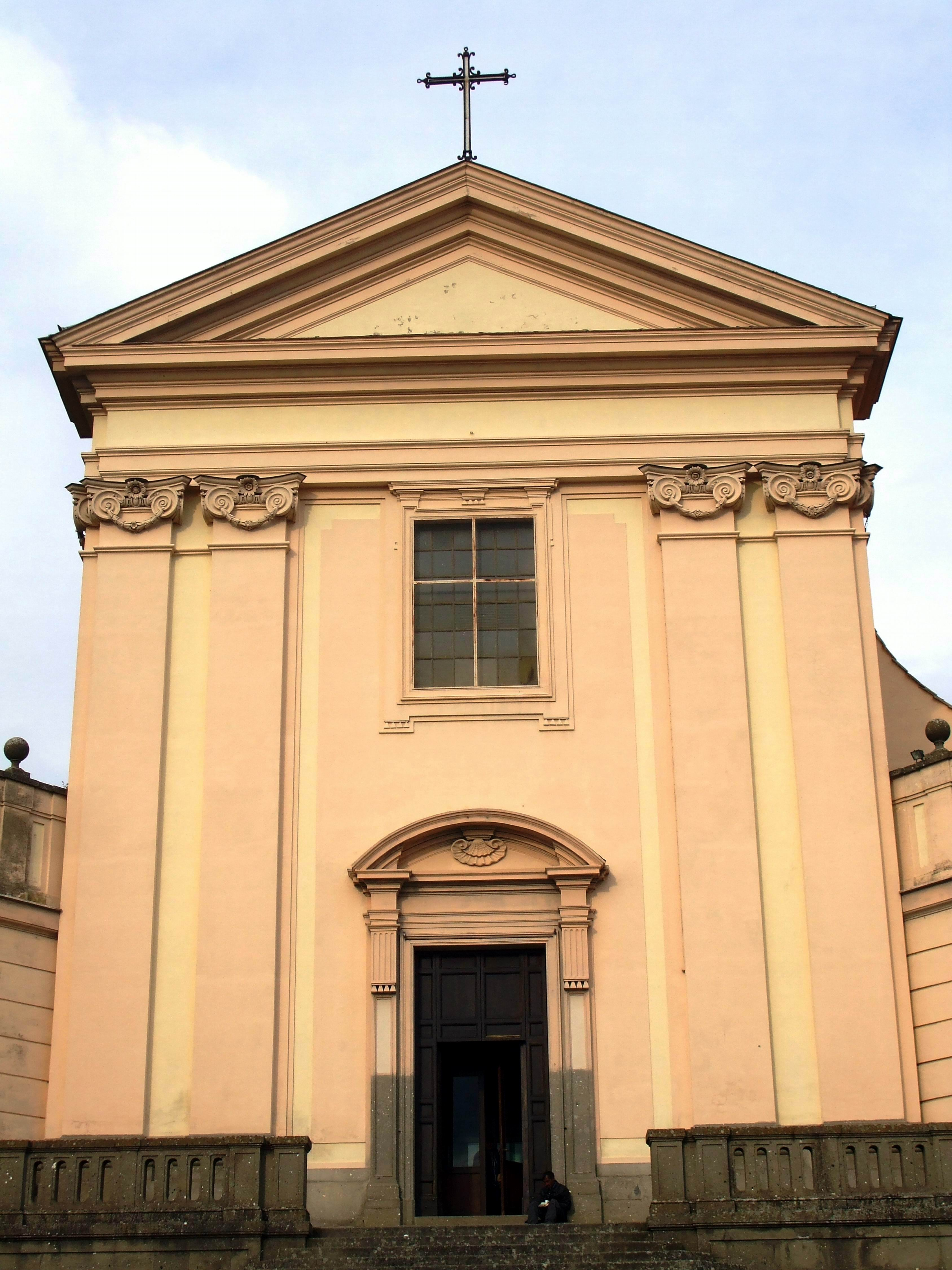 Albano Laziale Chiesa di San Paolo